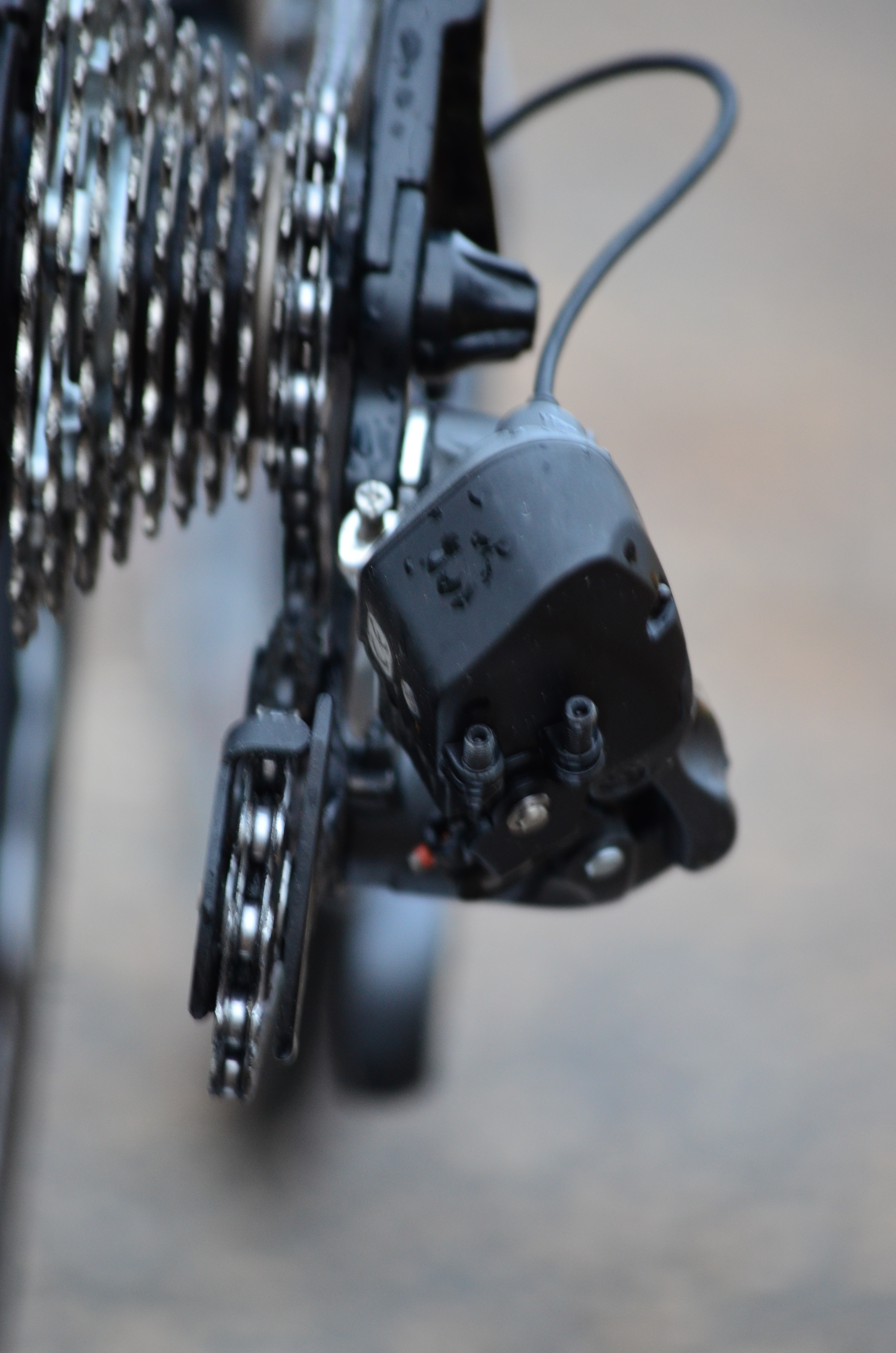 Ultegra Di2 Fulcrum Racing Quattro